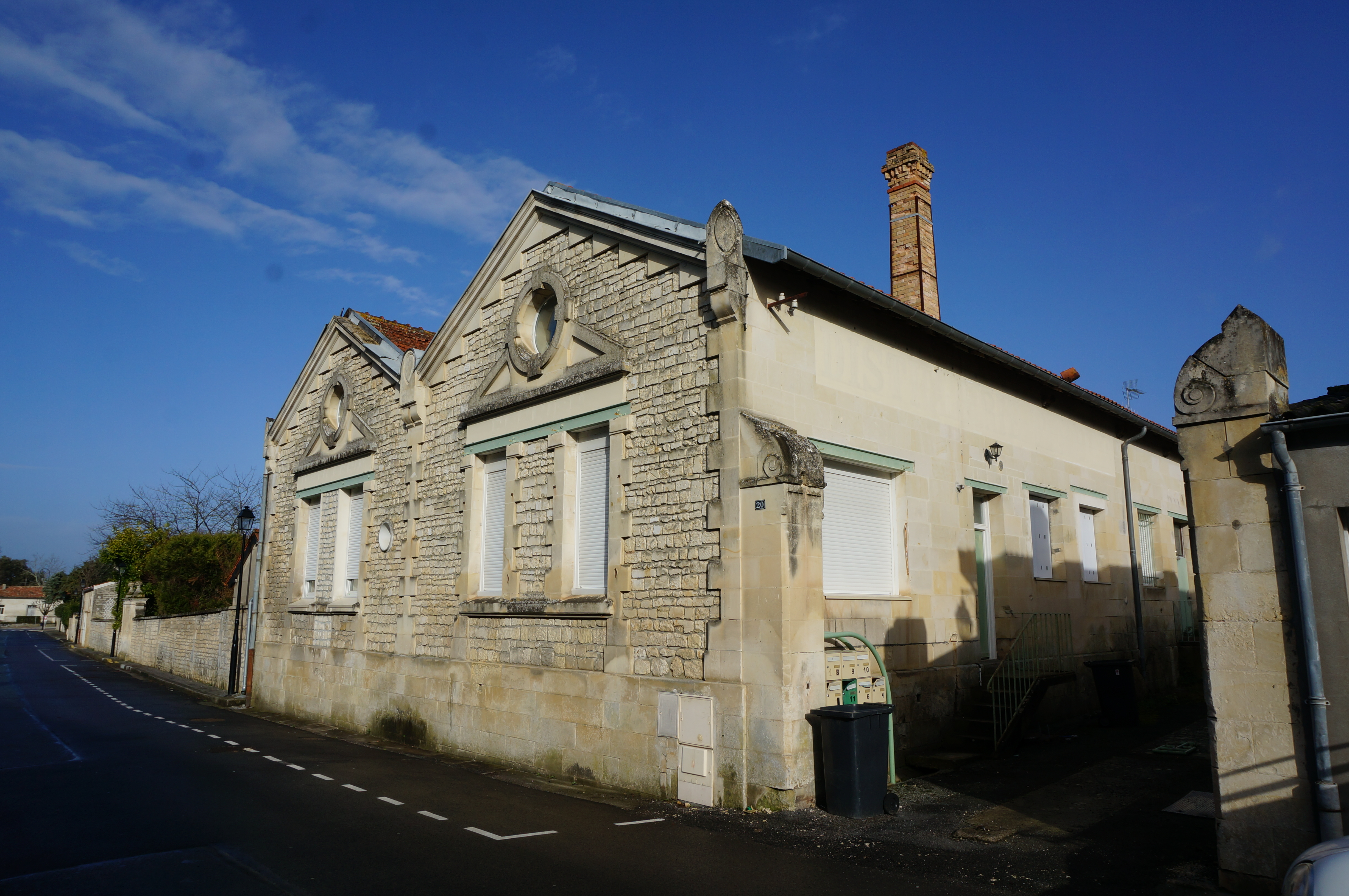 à Pons, ancien chais reconverti en habitation.